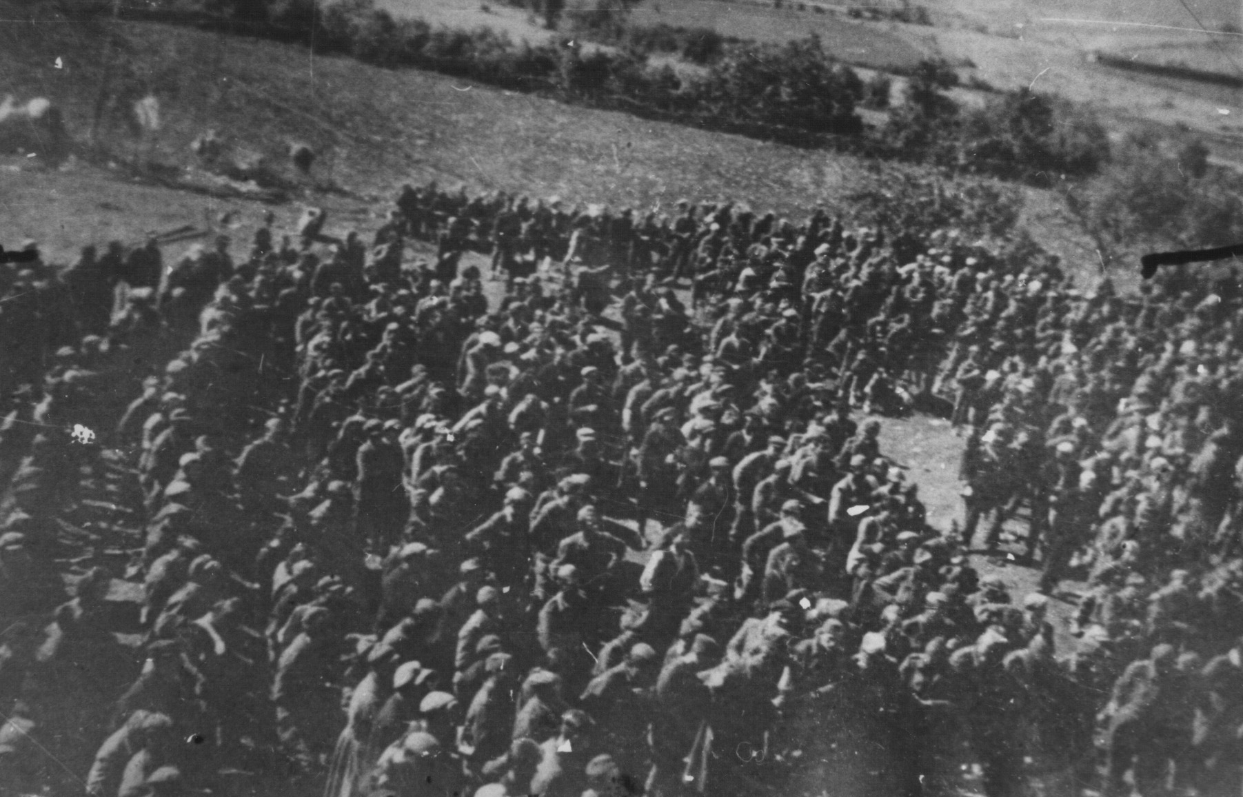 Srpskohrvatski / српскохрватски: Formiranje Četvrte kosovske brigade u Krumi oktobra 1944.